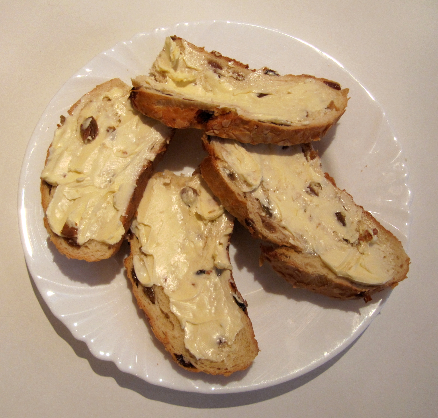 aufgeschnittenes_Osterbrot_Hamburg_2.jpg